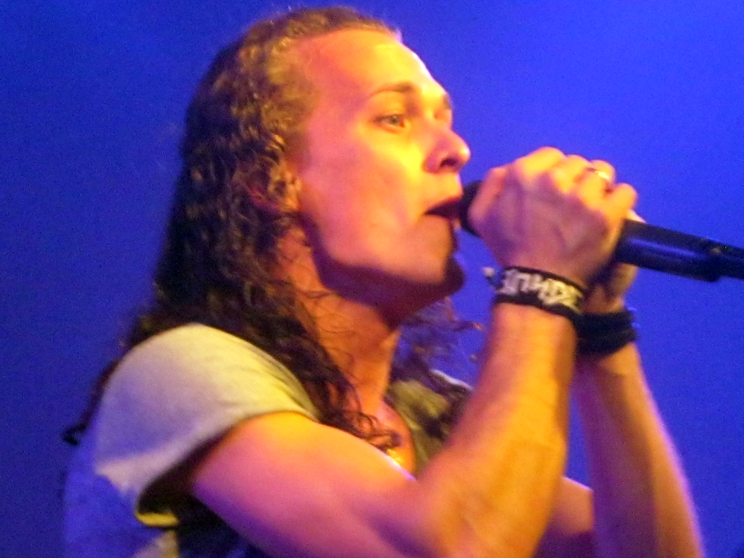 Russian Power Metal band Epidemia in Israel, 2015